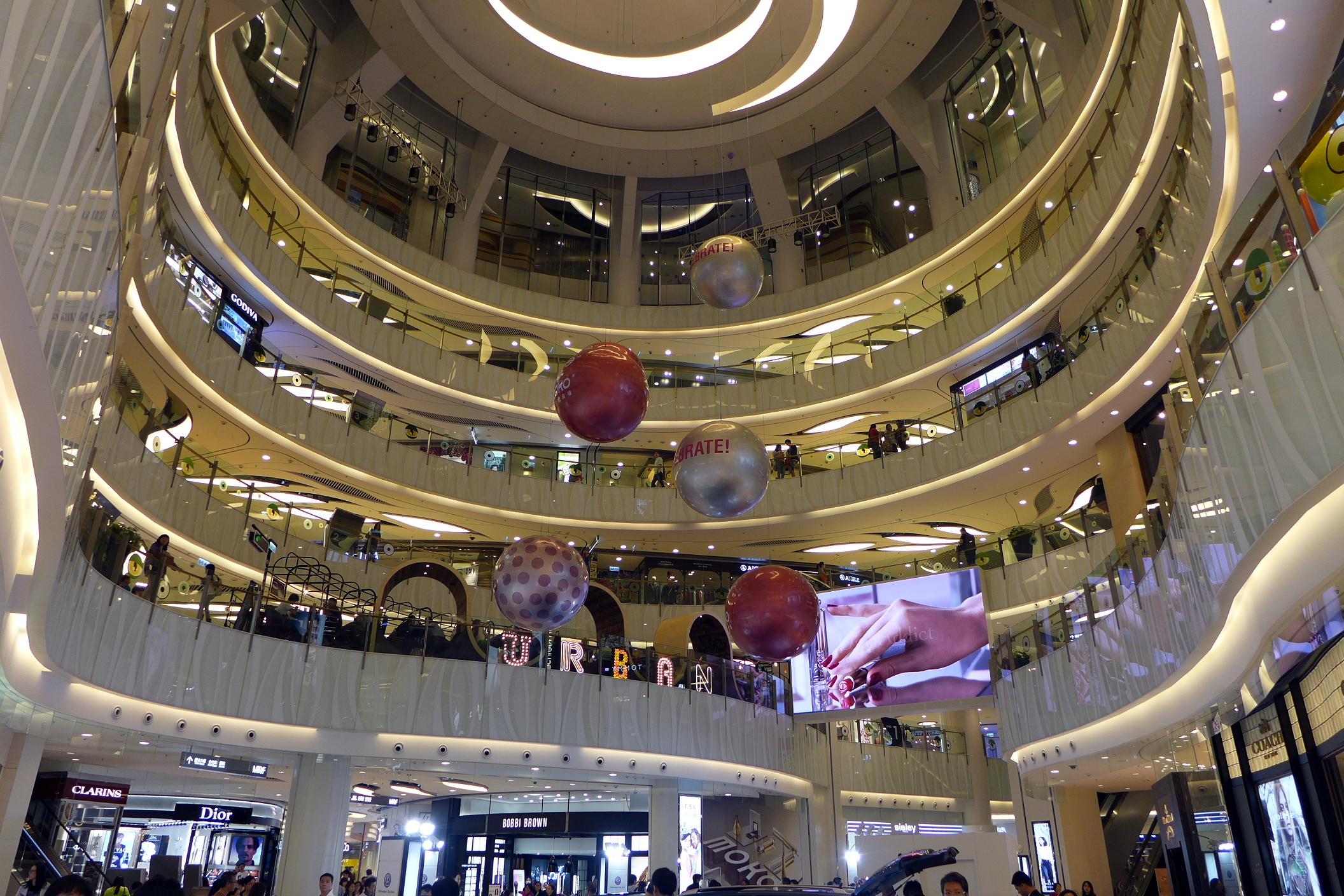 MOKO Mall Atrium